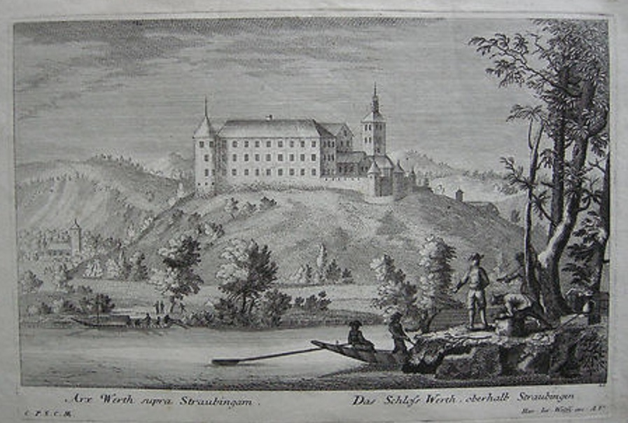 Schloss Wörth an der Donau zeitgenössisch 17./18 Jahrhundert Scan Postkarte